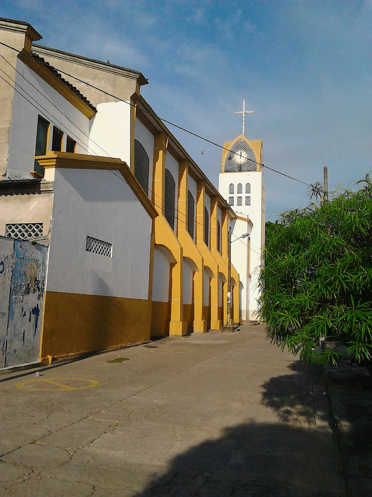 Iglesia San Luis Beltran Puerto Nare - Antioquia